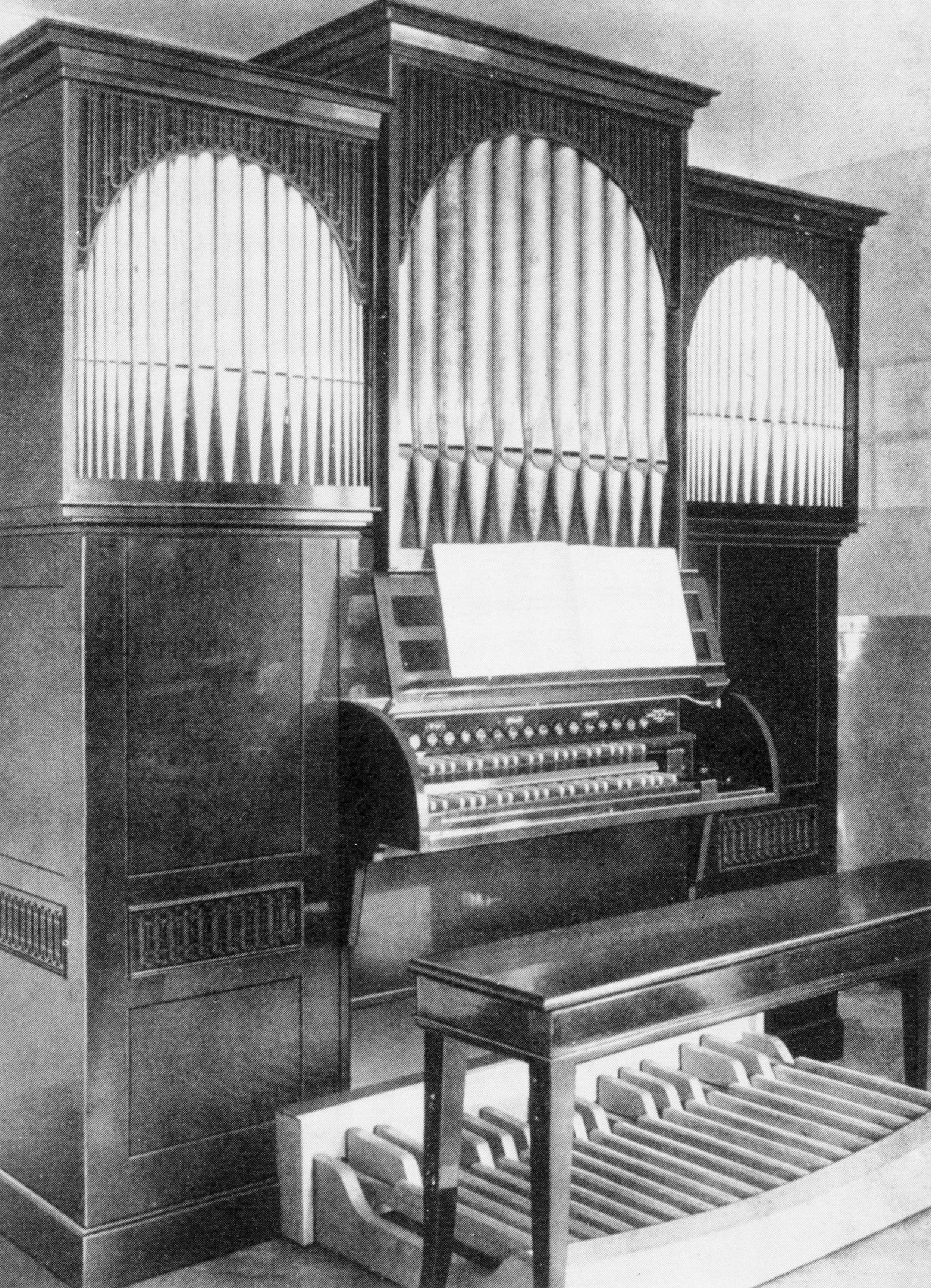 Hausorgel von Hugo Distler, 1940 in Strausberg bei Berlin; heute ist das Instrument in St. Jakobi in Lübeck aufgestellt